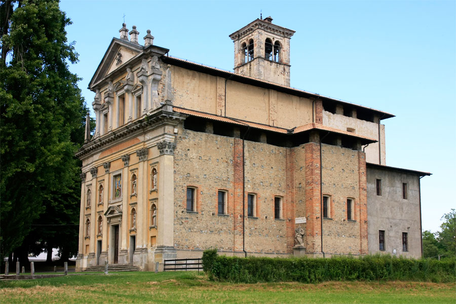 Santuario della Madonna della Ghianda a Somma Lombardo